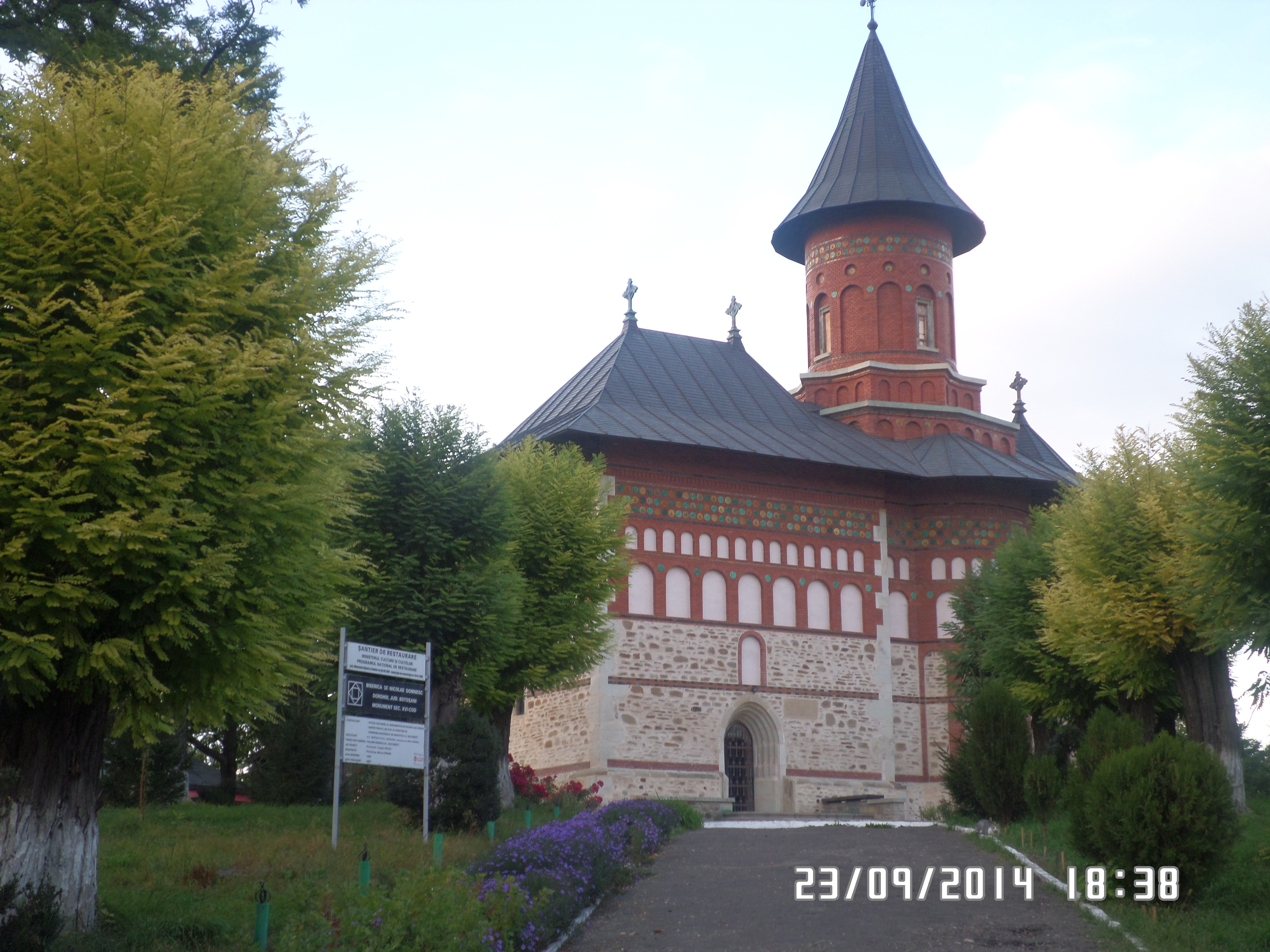 Biserica Domneasca din Dorohoi, inchinata Sfantului Ierarh Nicolae a fost ctitorita in anul 1495, de catre Sfantul Voievod Sfefan cel Mare, si a fost sfintita in data de 18 octombrie a aceluiasi an. Spre slava lui Dumnezeu, biserica isi pastreaza pana astazi zidurile originale si forma initiala. In perioada anilor 1896-1921, biserica a fost restaurata de cateva ori. 01